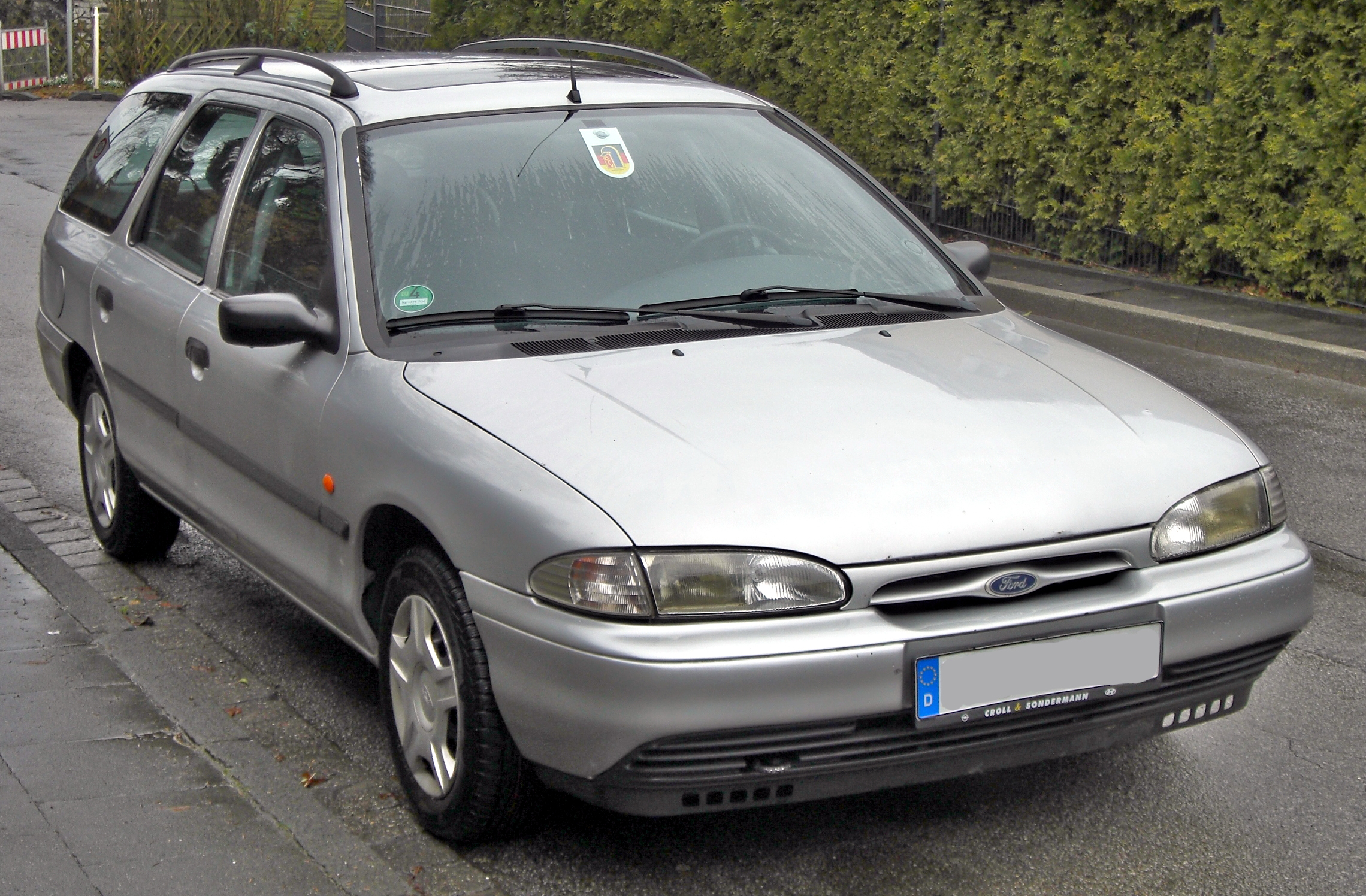 Ford Mondeo I Turnier